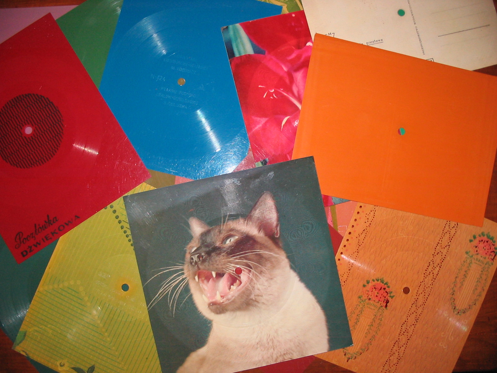 Pocztówki dźwiękowe/Sound postcards